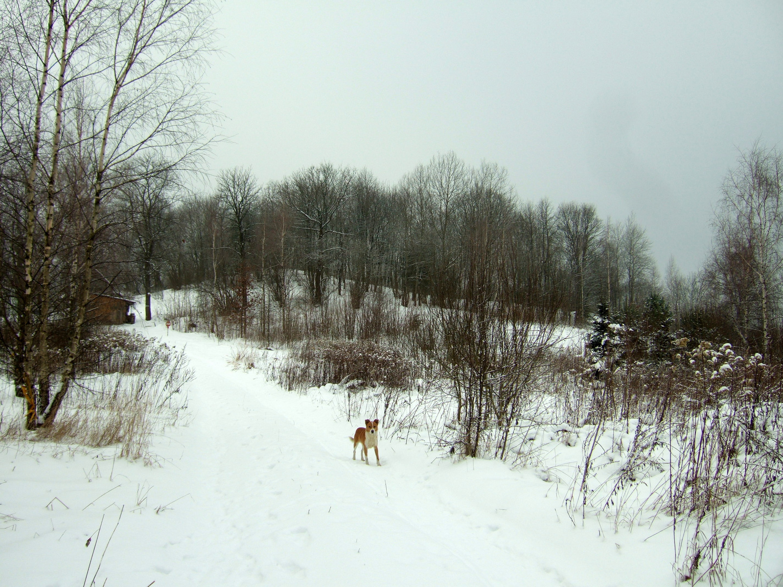 Rokantiškių kalva Vilniuje žiemą